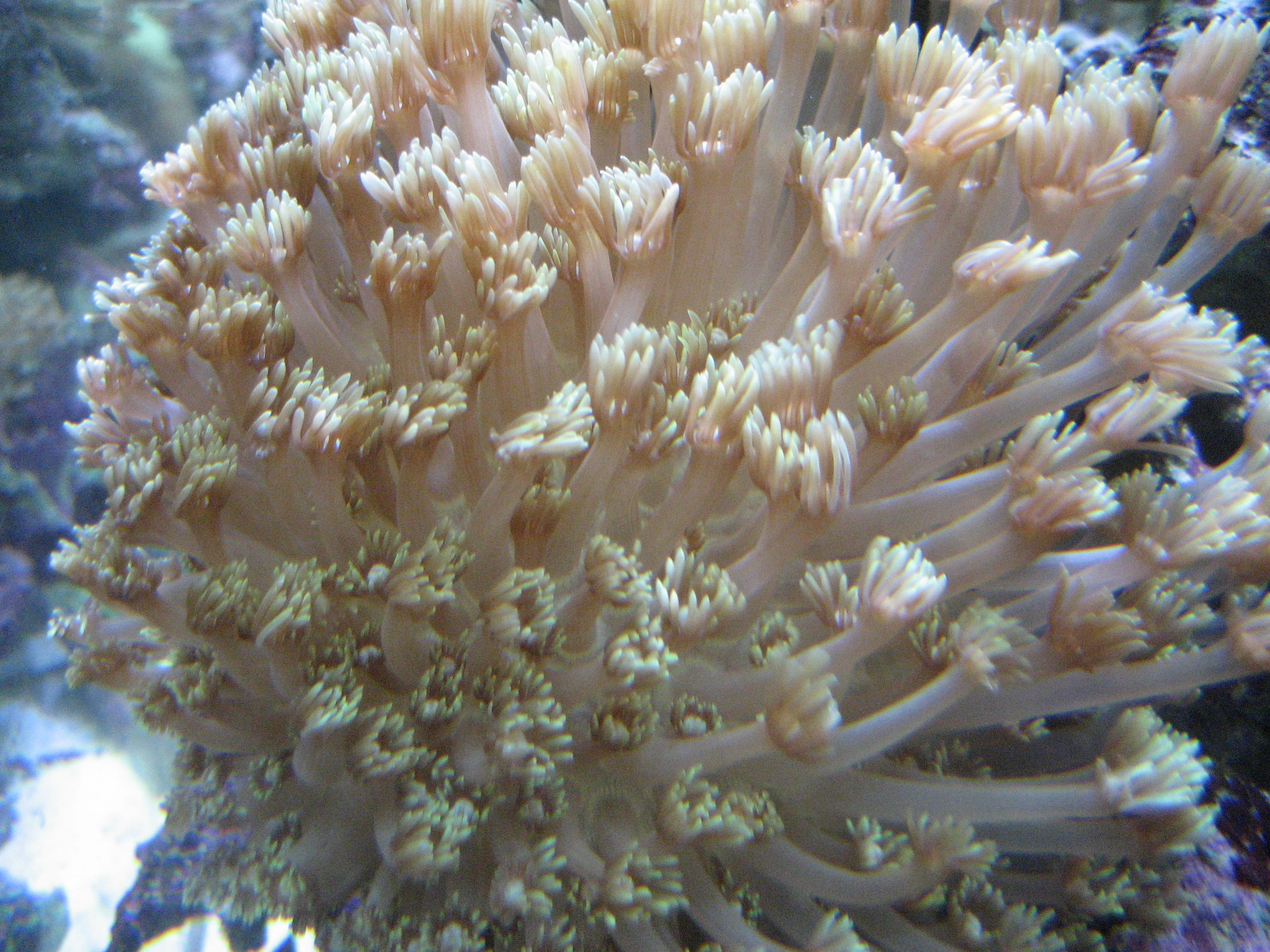 Goniopora sp.